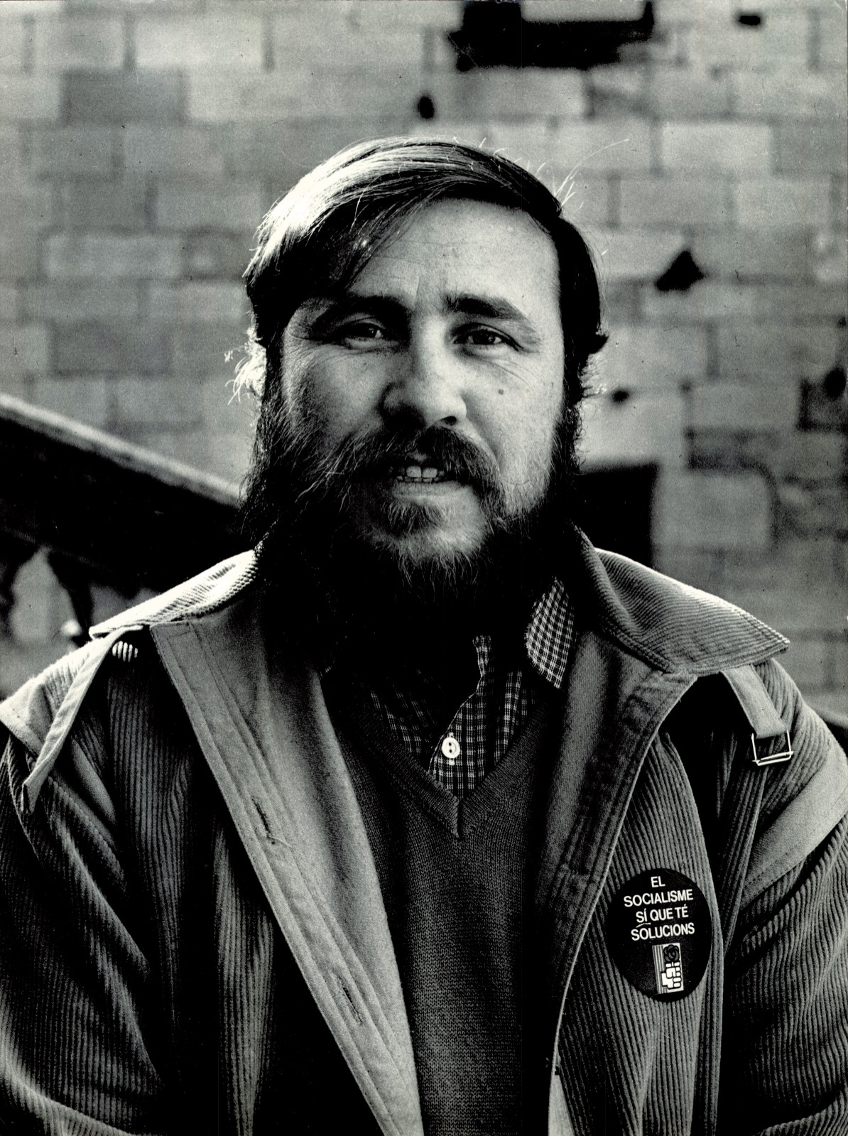 Fotografia de Just Manuel Casero feta per Quim Curbet de la seva candidatura al partit socialista per a les primeres eleccions democràtiques de 1979 a l'Ajuntament de Girona.